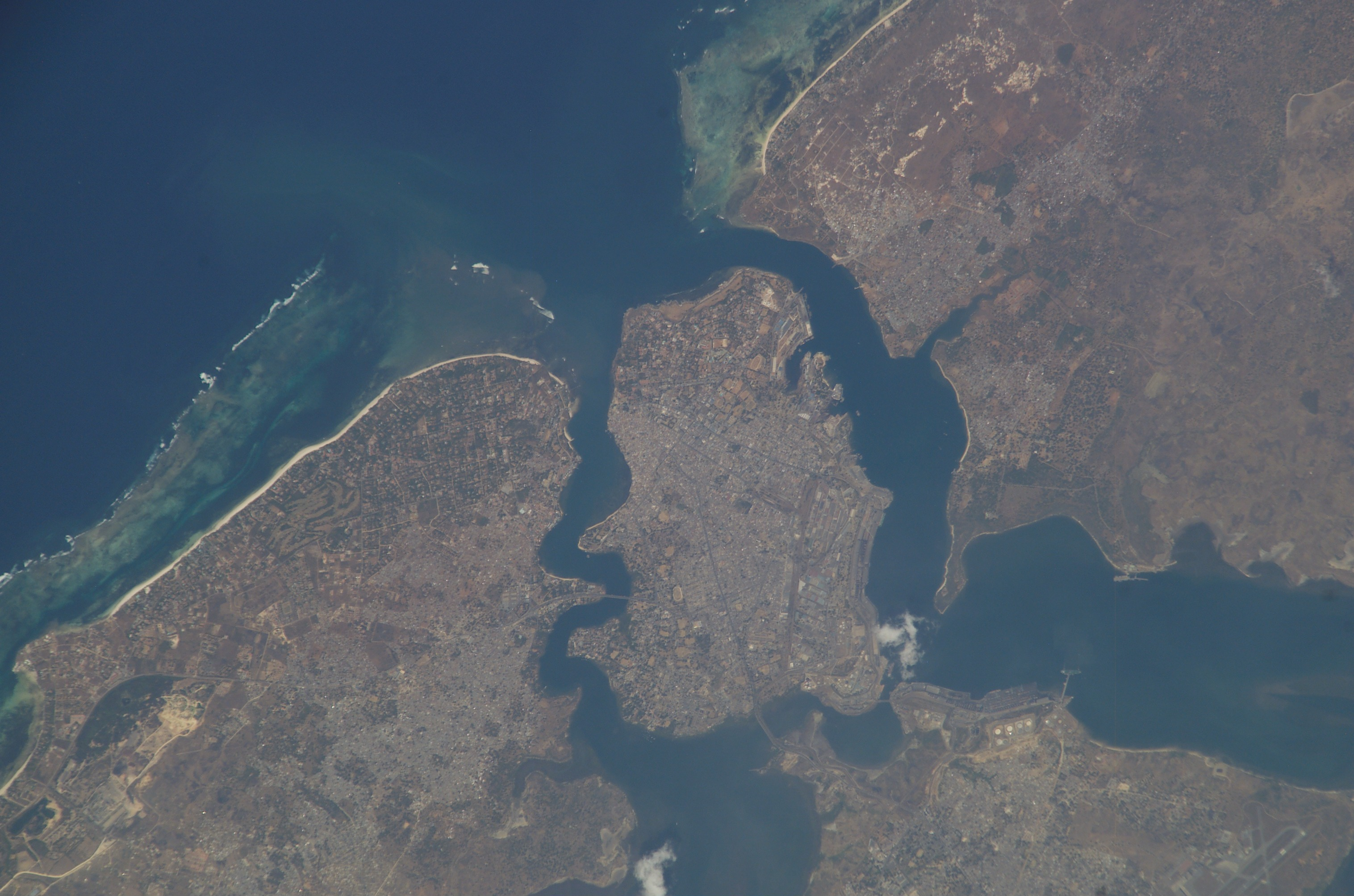 Vue satellite de Mombasa prise par l'ISS. Le Sud est en haut de la photo.